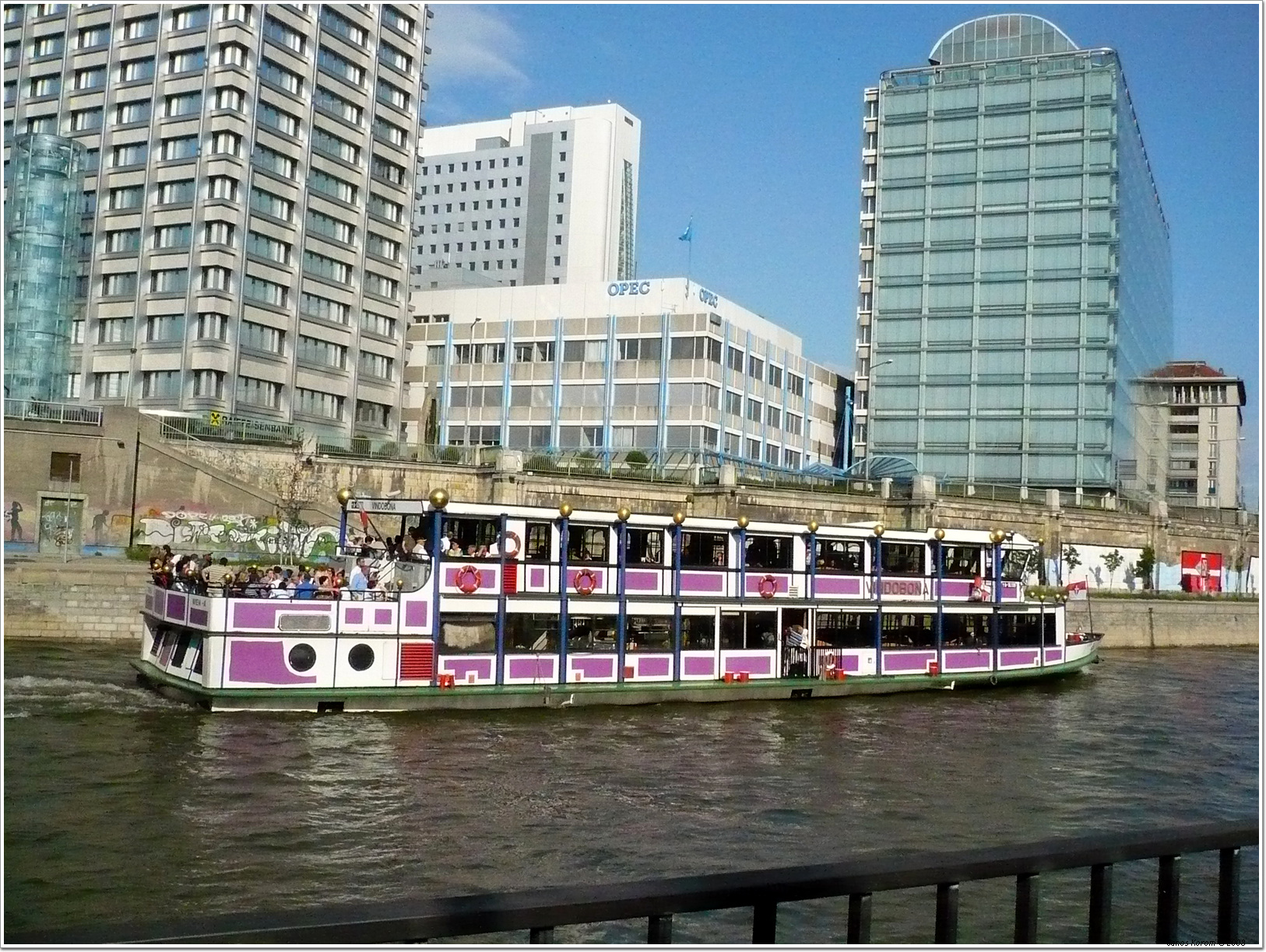 Vindobona